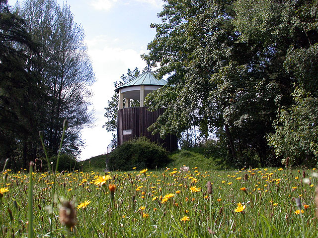 Der Aussichtsturm auf dem Wartberg